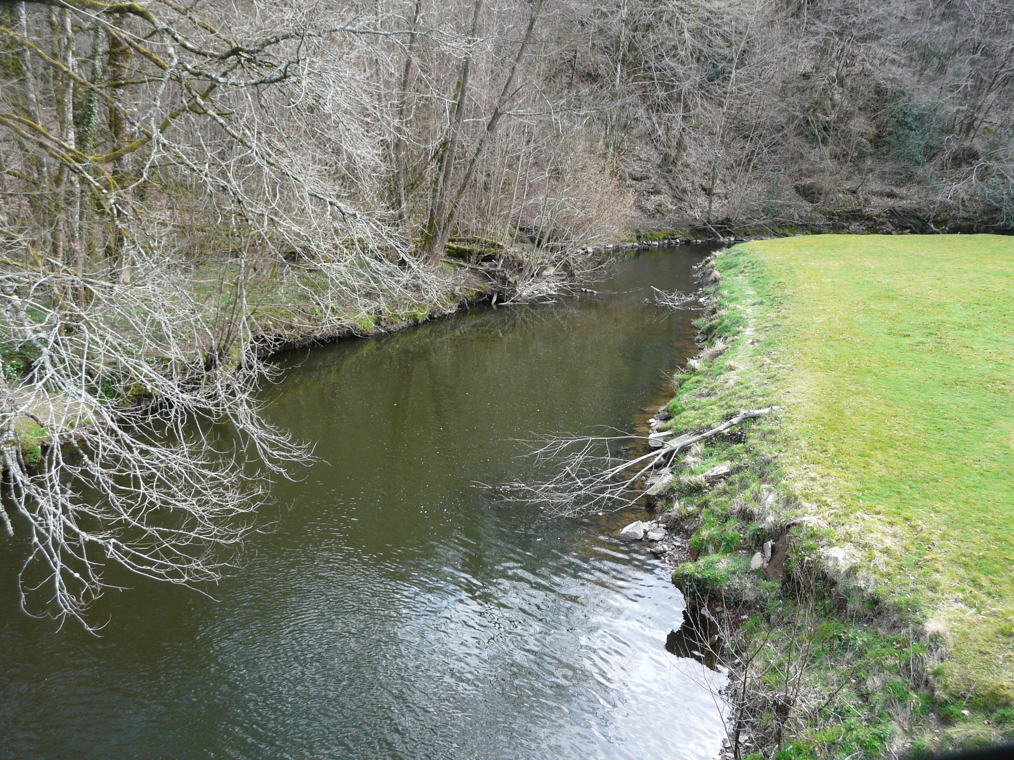 La rivière la Loue au moulin de Beausoleil, marque la limite entre Angoisse (à gauche) et Sarlande (à droite), Dordogne, France. Vue vers l'aval.